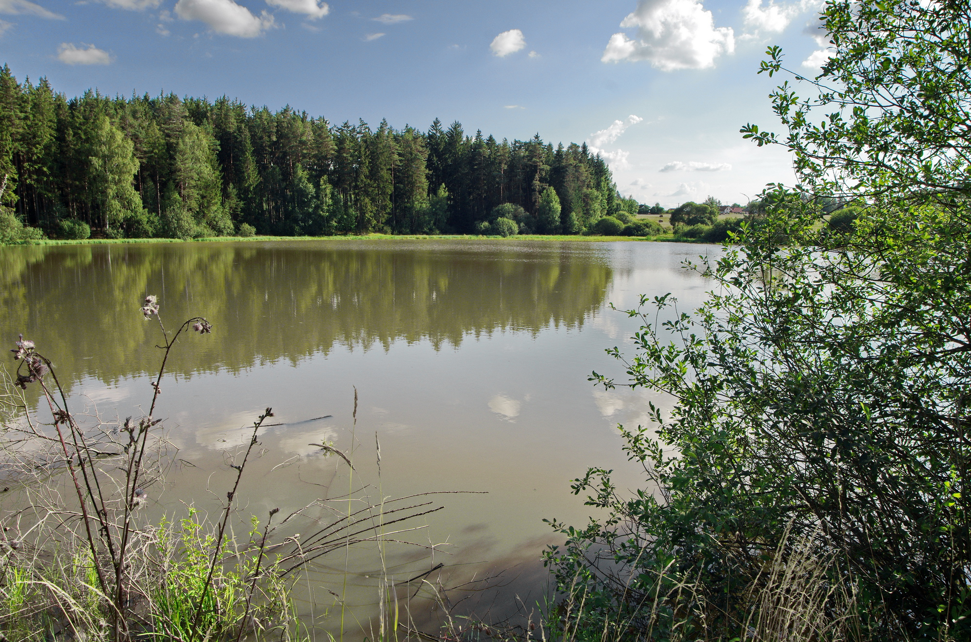 Ohradský rybník na Panském potoce, Hamrníky, okres Cheb